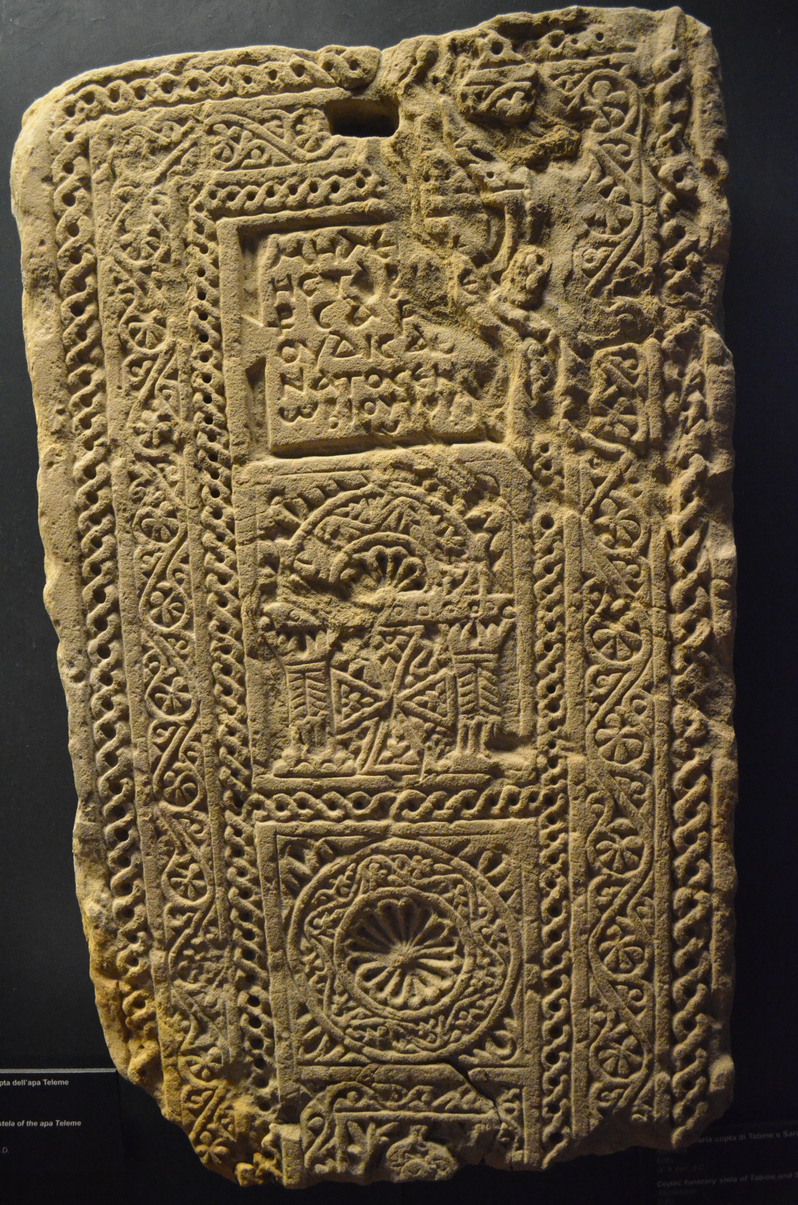 Vatican Museums